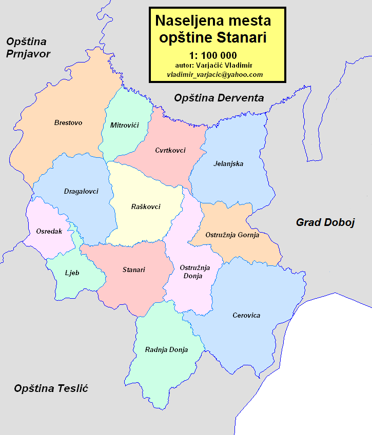 Opština Stanari